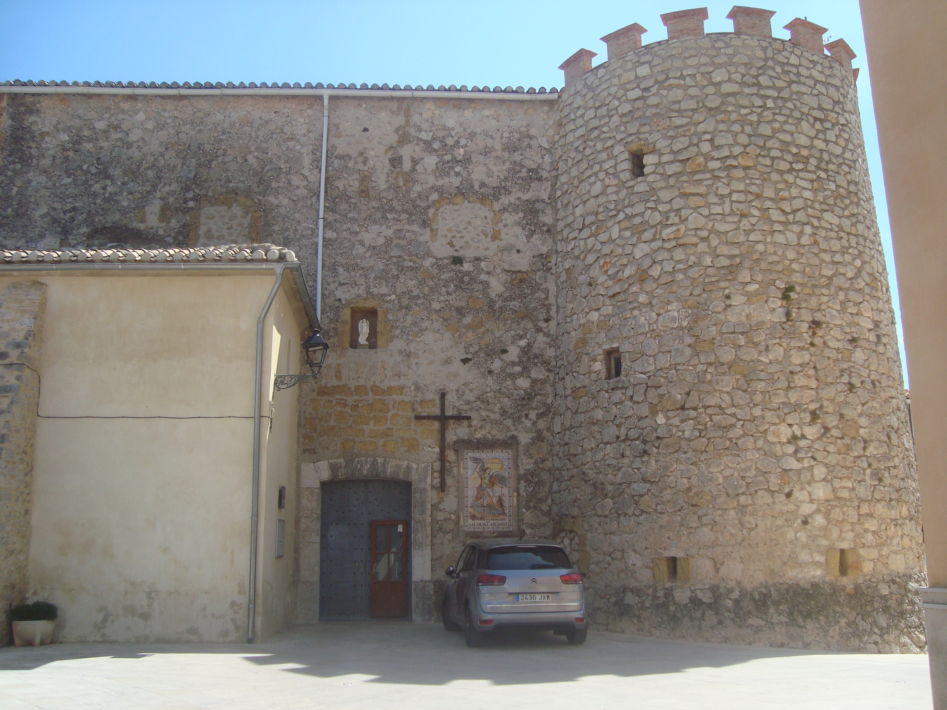 Castell-Església parroquial de Sant Miquel Arcàngel (Murla)